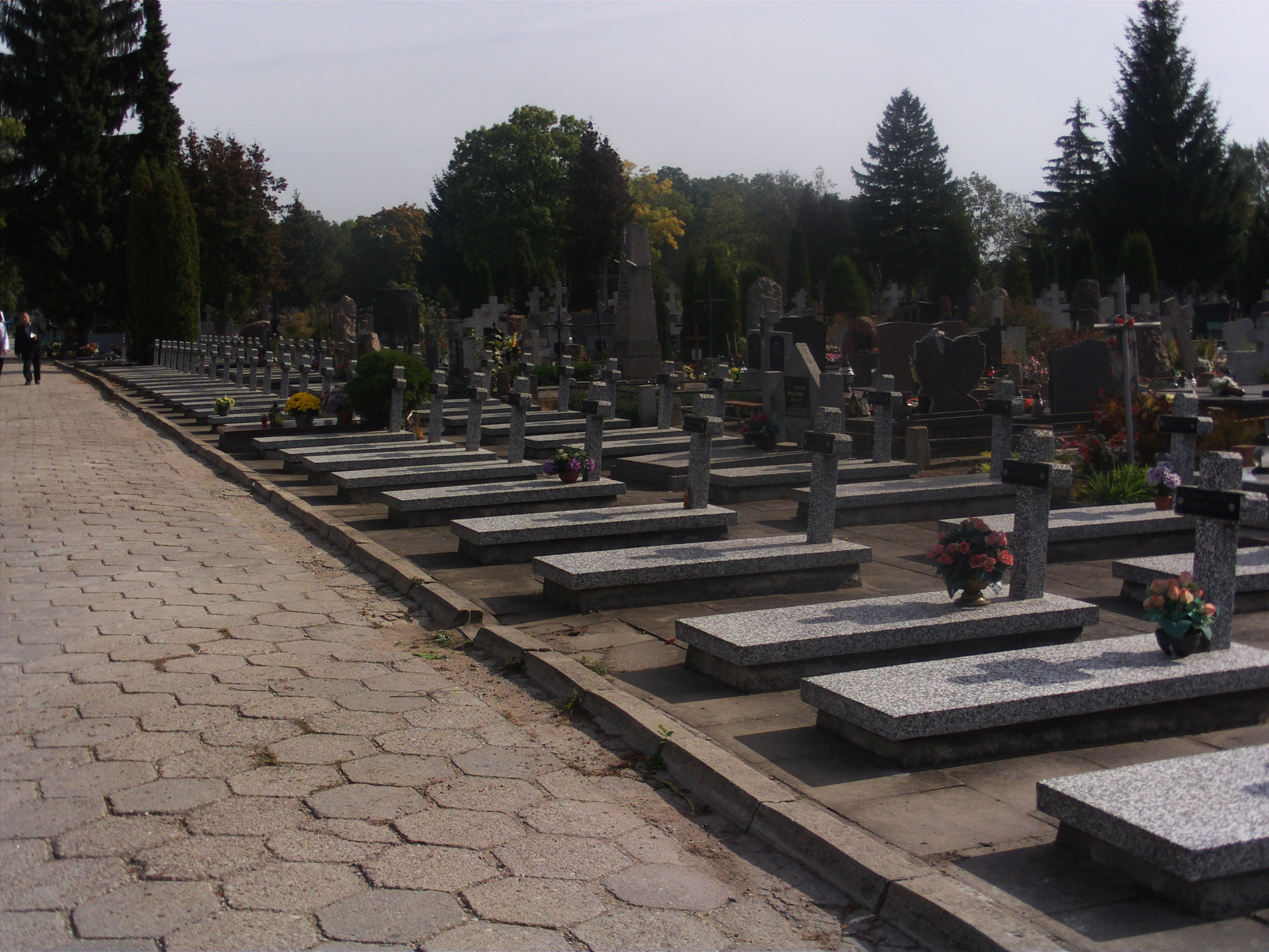 Cmentarz Rzymskokatolicki w Suwałkach